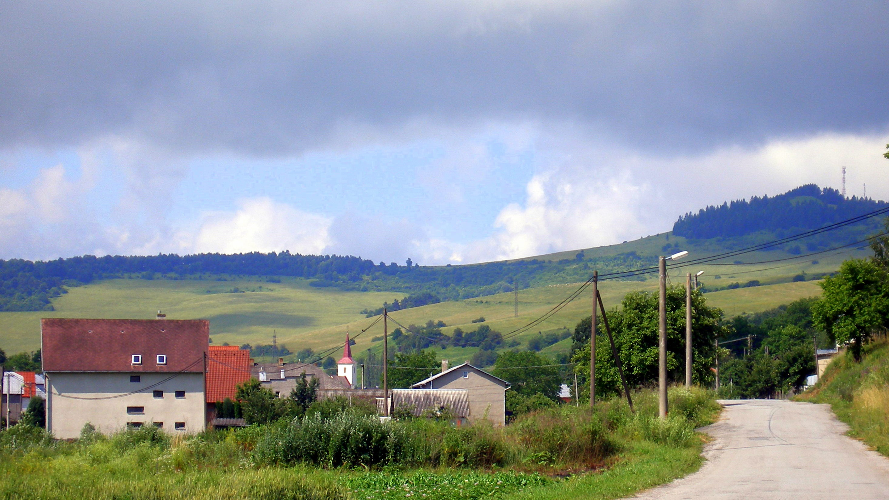 Obec Ďačov okres Sabinov